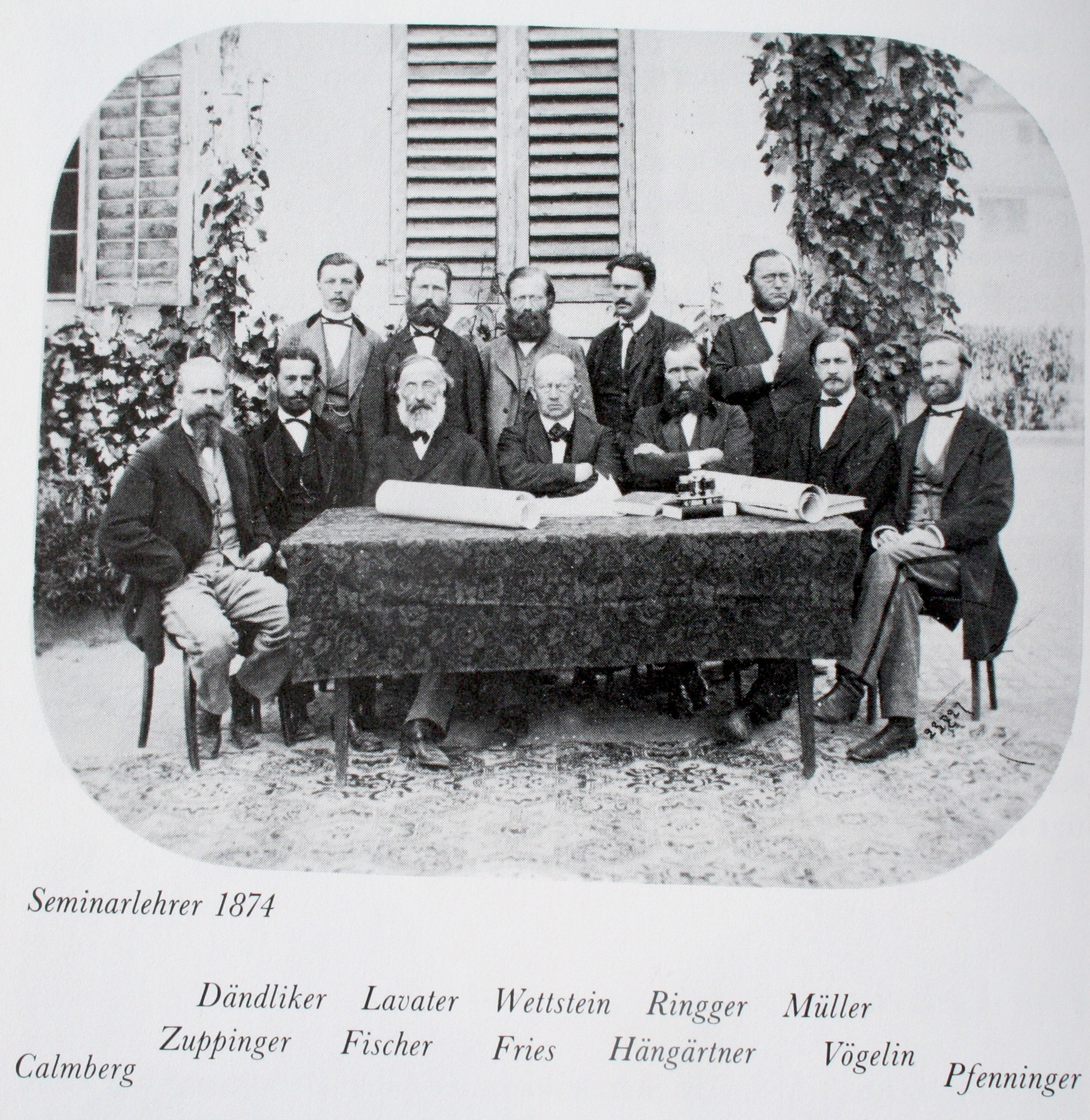 Seminar Küsnacht: Lehrerschaft 1874